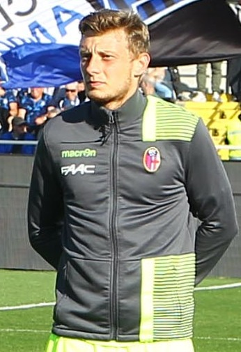 Bergamo, stadio Atleti Azzurri d'Italia, 22 aprile 2017. Il calciatore Ladislav Krejčí al Bologna, prima della trasferta persa contro l'Atalanta (2-3) e valevole per la 33ª giornata del campionato italiano di Serie A 2016-17.